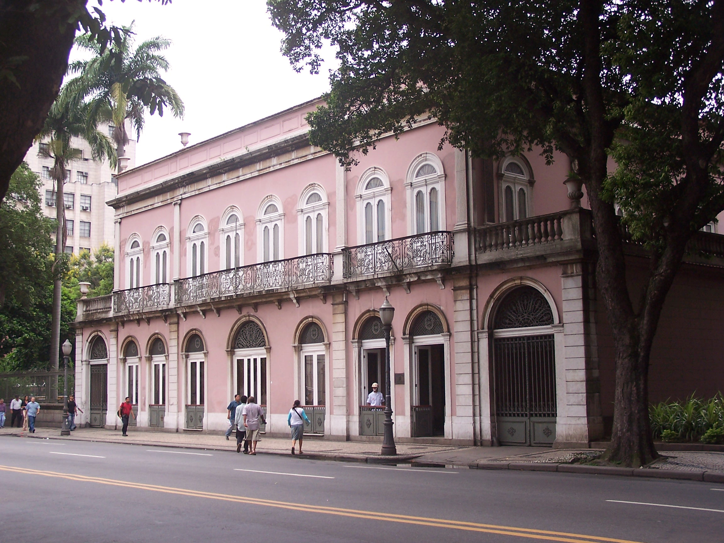 Palácio do Itamaraty in Rio de Janeiro, Brazil